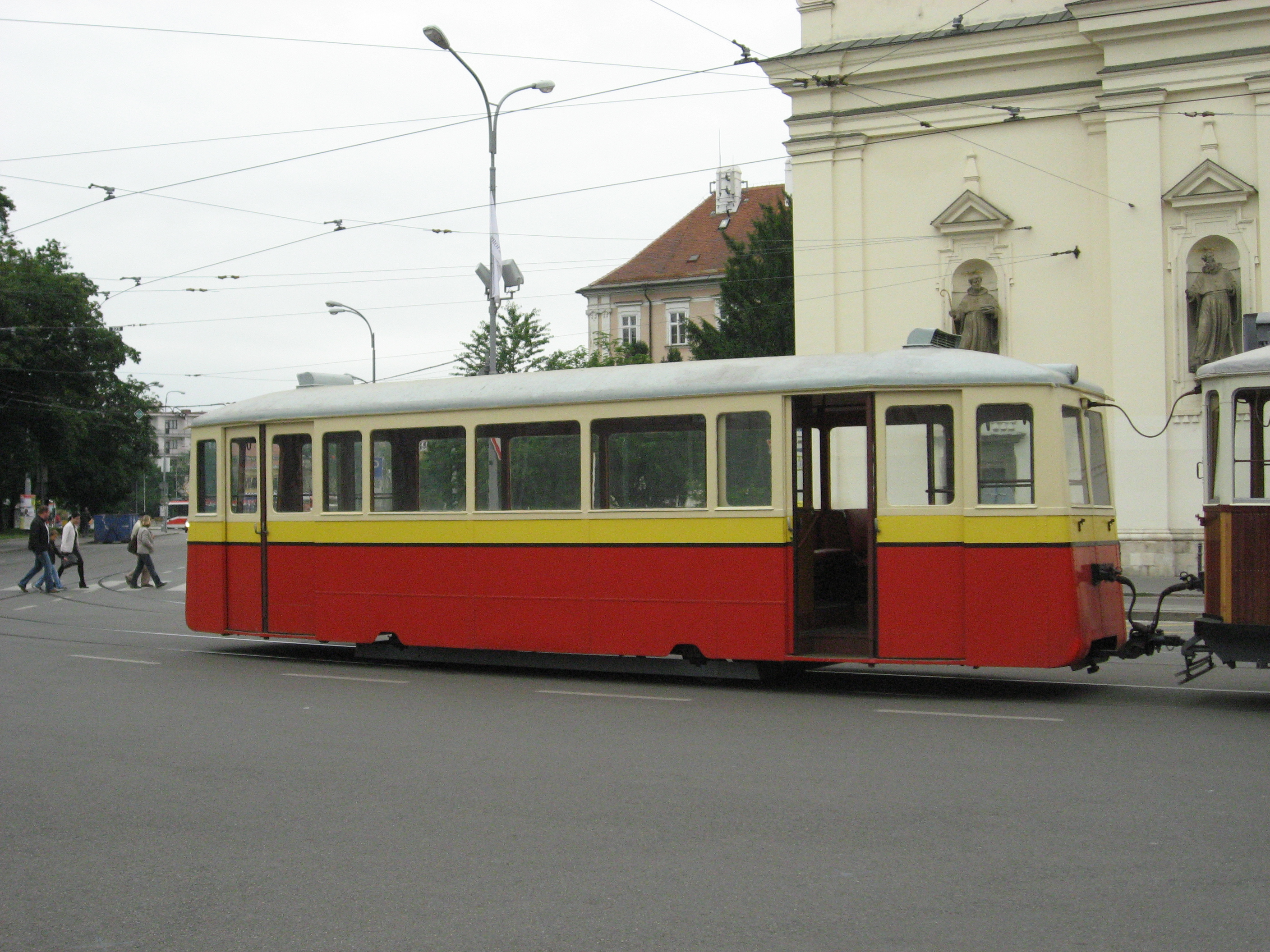 Brno, 140 let MHD